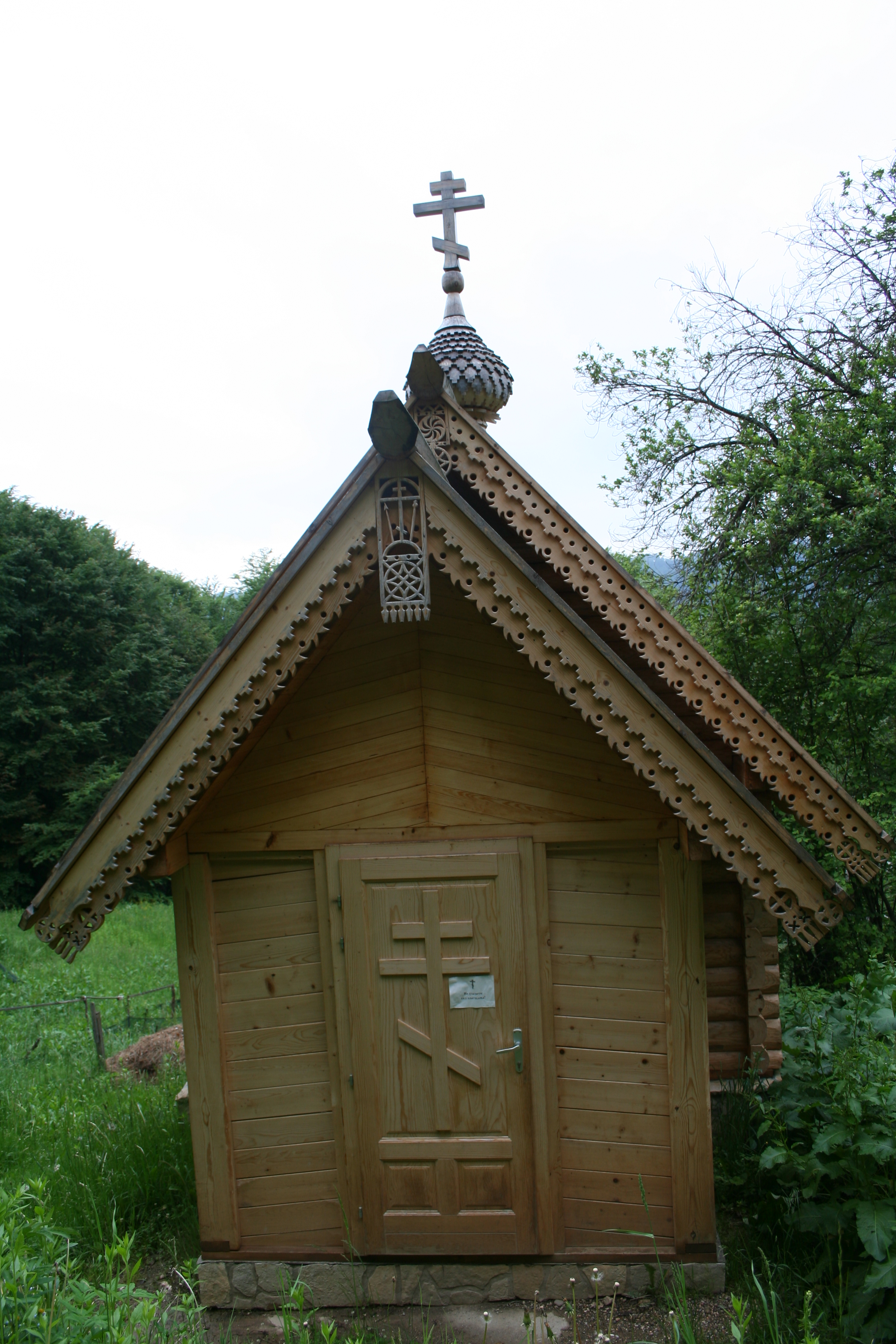 Manastir Sv. mučenika Romanovih, Bačevci